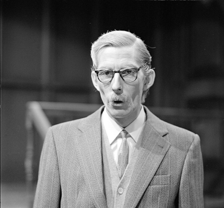 Martin Brozius